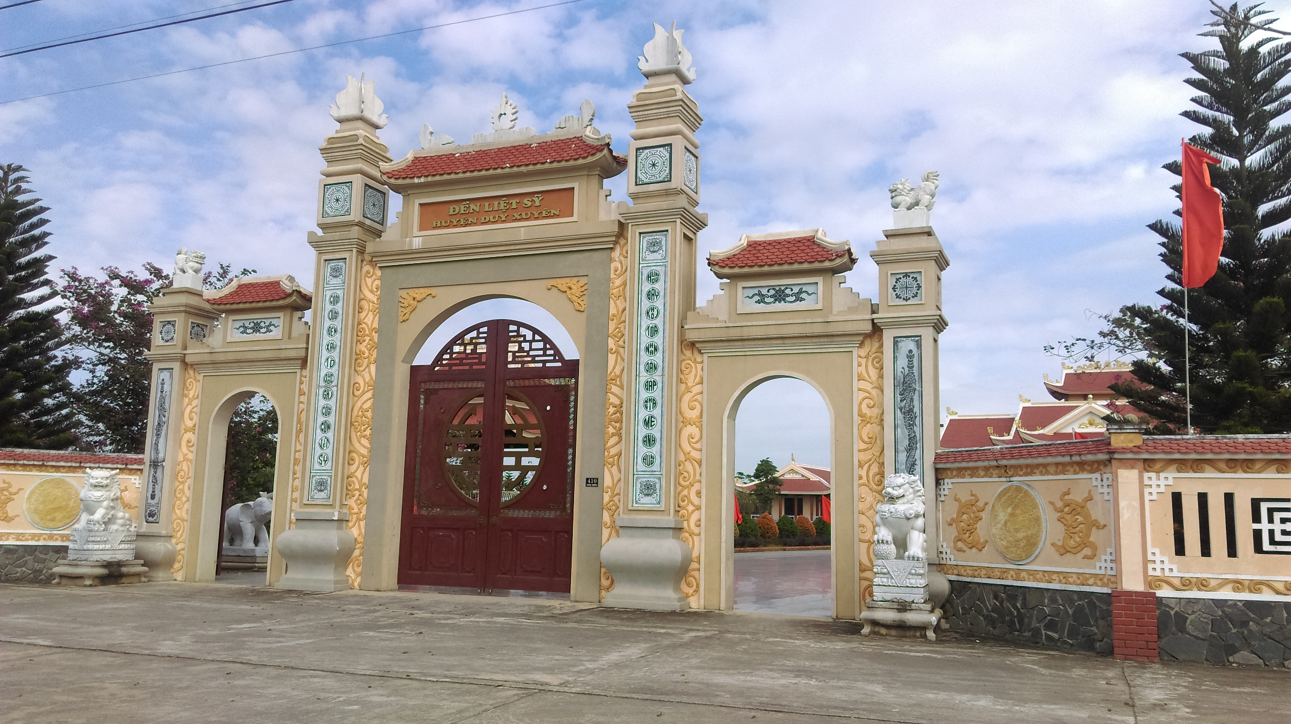 Đền Liệt sĩ huyện Duy Xuyên, Quảng Nam